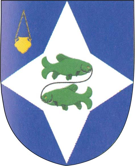 Znak obce Rebešovice